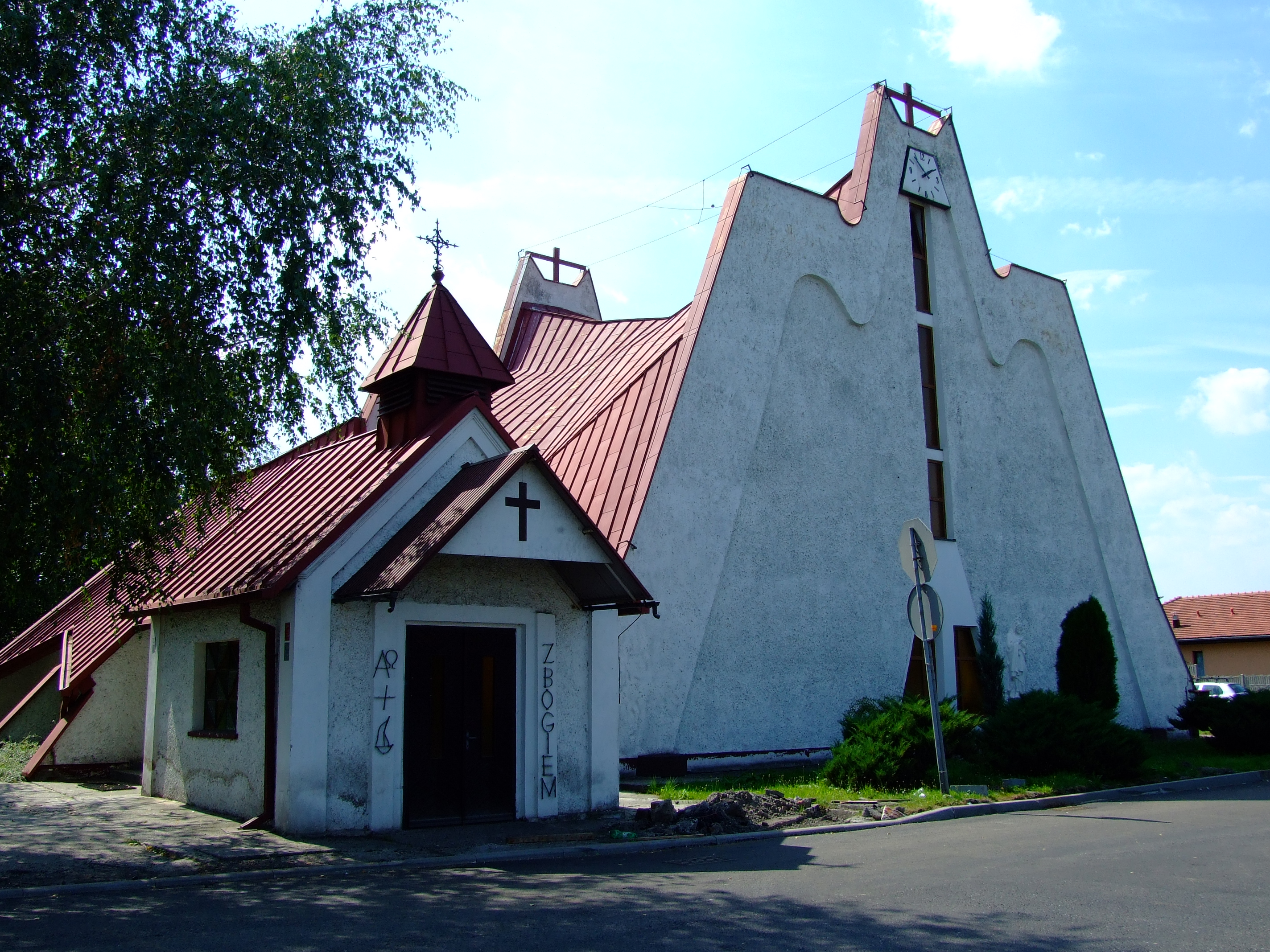 Kościół p.w. MB Różańcowej w Kleszczowie (województwo śląskie)